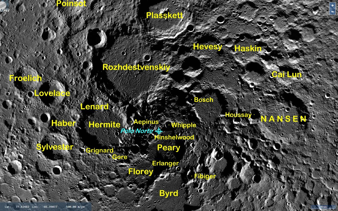 Cráteres lunares próximos al Polo Norte. (Imagen LRO)